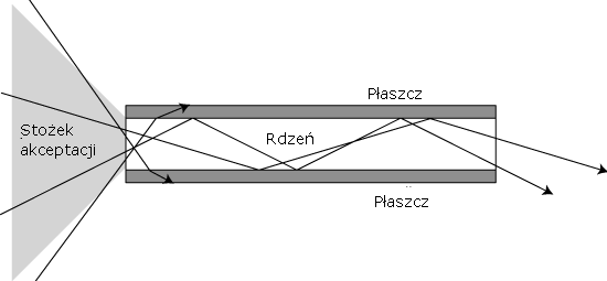 Schemat włókna światłowodowego